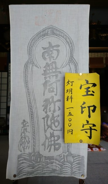 観自在寺の宝印守